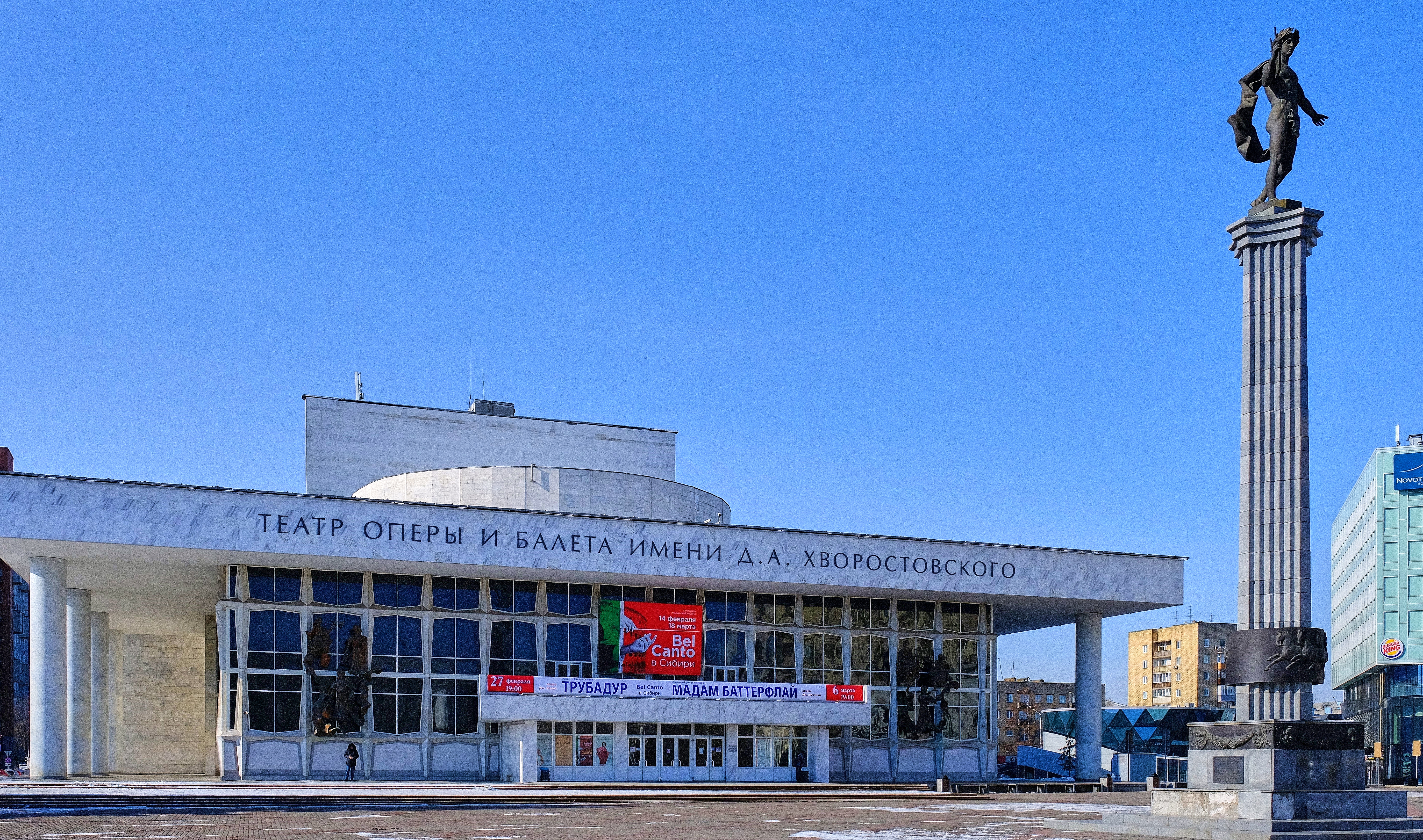 Красноярский государственный театр оперы и балета